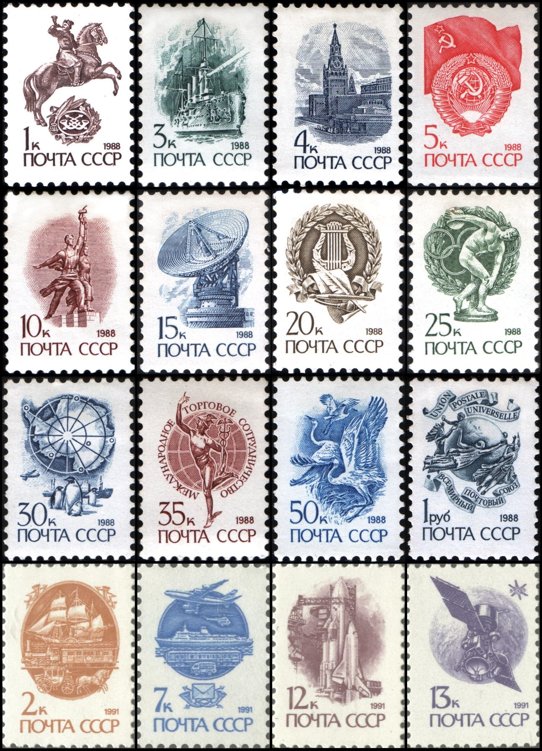 Тринадцатый выпуск стандартных марок СССР (1988—1991). Автором последнего (тринадцатого) стандартного выпуска, вышедшего в обращение в декабре 1988 — декабре 1989 года, был художник Владислав Коваль. В составе серии выпущено 16 миниатюр.